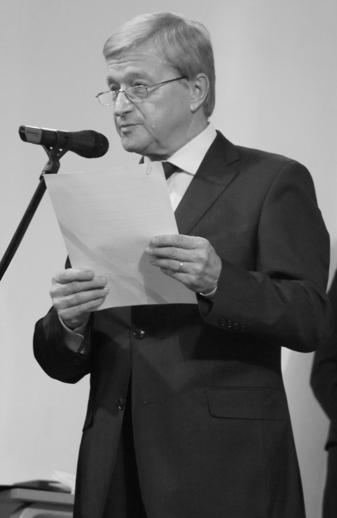 Tadeusz Strugała przewodniczący konkursowego jury (ogłoszenie wyników konkursu) podczas VIII Międzynarodowego Konkursu Dyrygentów im. Grzegorza Fitelberga w Filharmonii Śląskiej w Katowicach